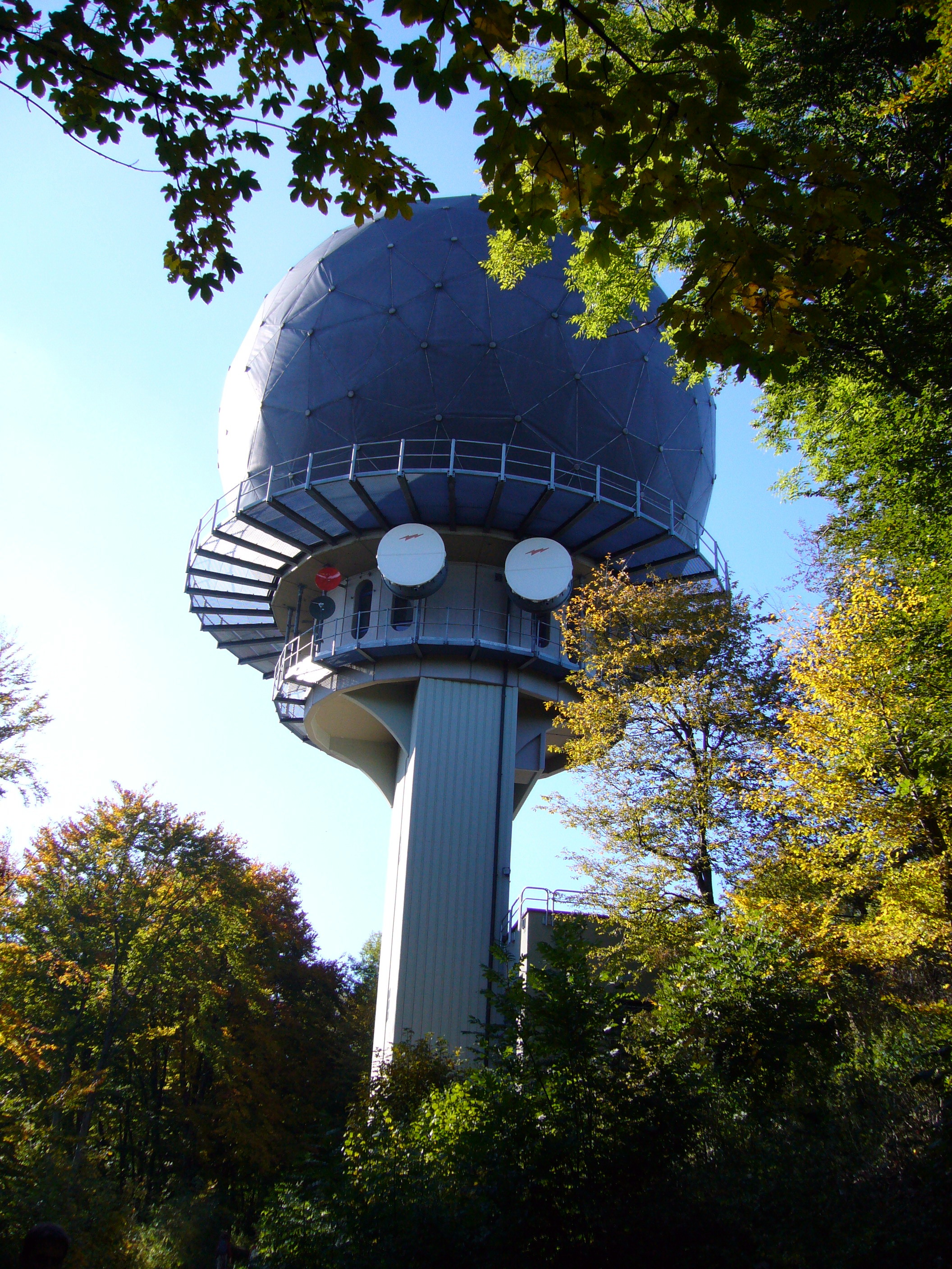 Radarkuppel der Schweizer Flugsicherung Skyguide auf der Lägern